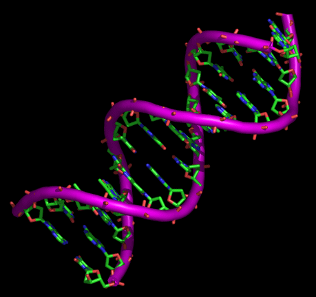 Transformación del ADN a Semen